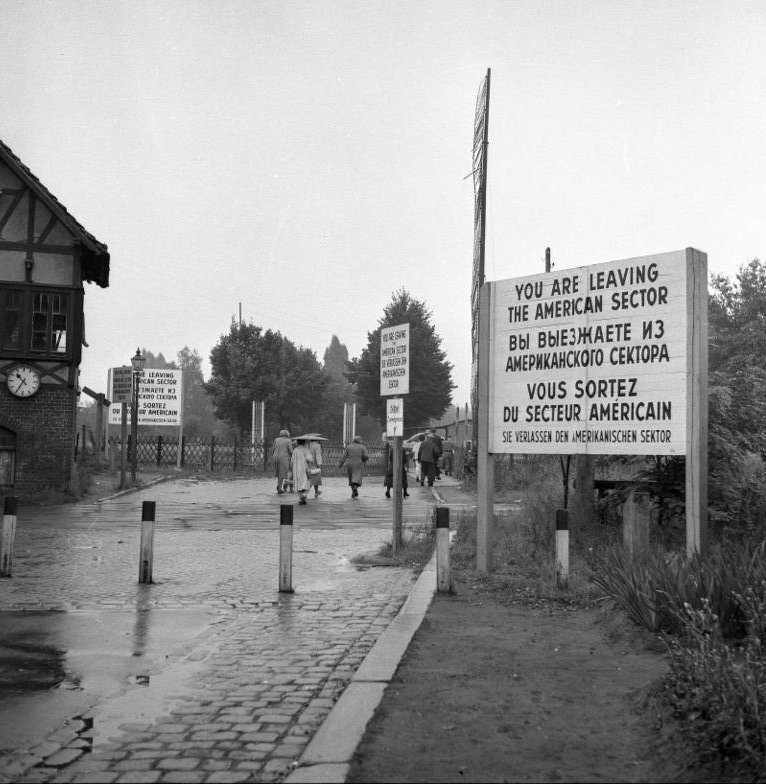 Berlin an der Zonengrenze Beschilderung Information added by Wikimedia users.Grenzgänger am heute stillgelegten Berliner S-Bahnhof Düppel.